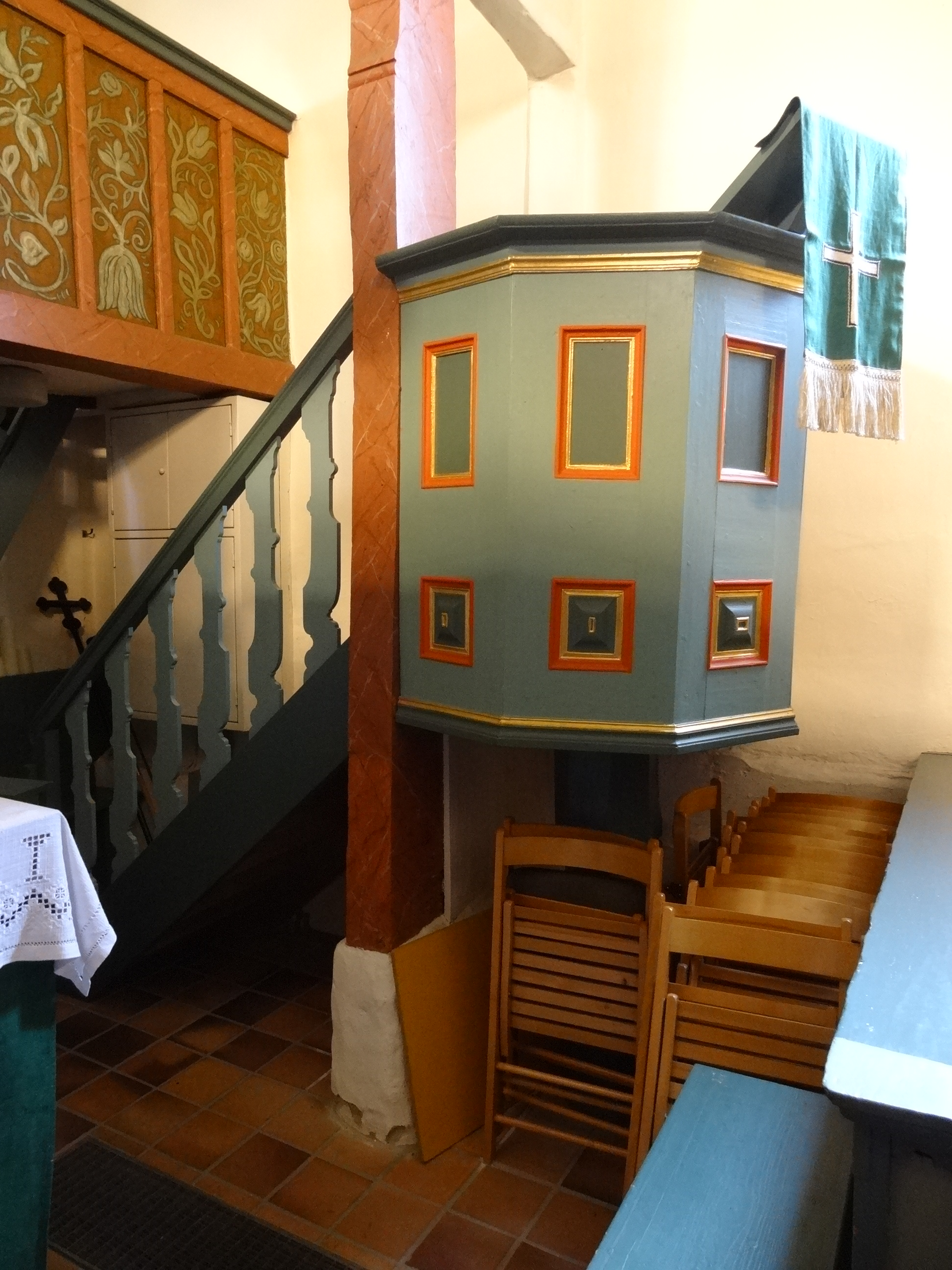 Evangelische Kirche Klein-Eichen